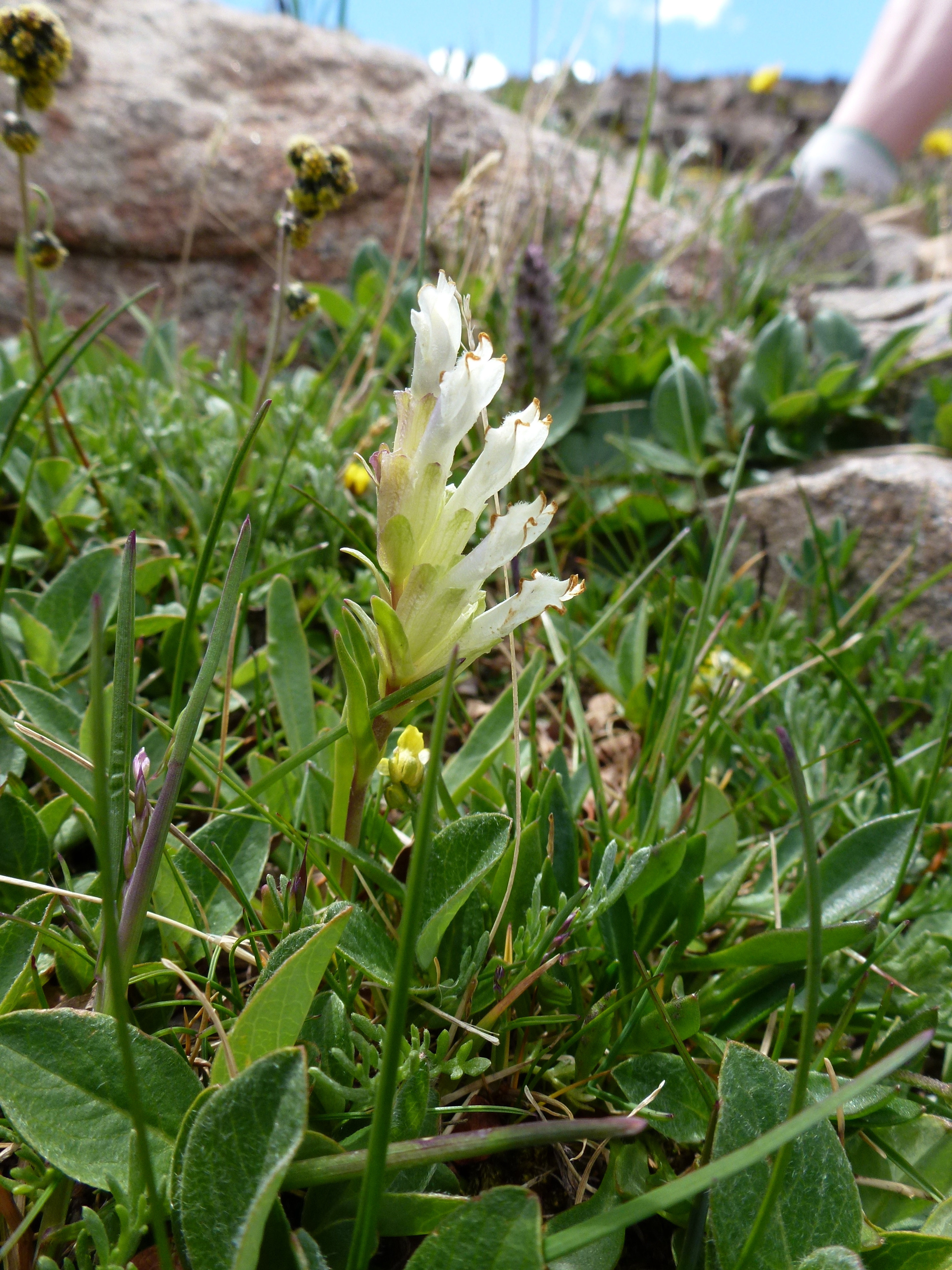 Chionophila jamesii